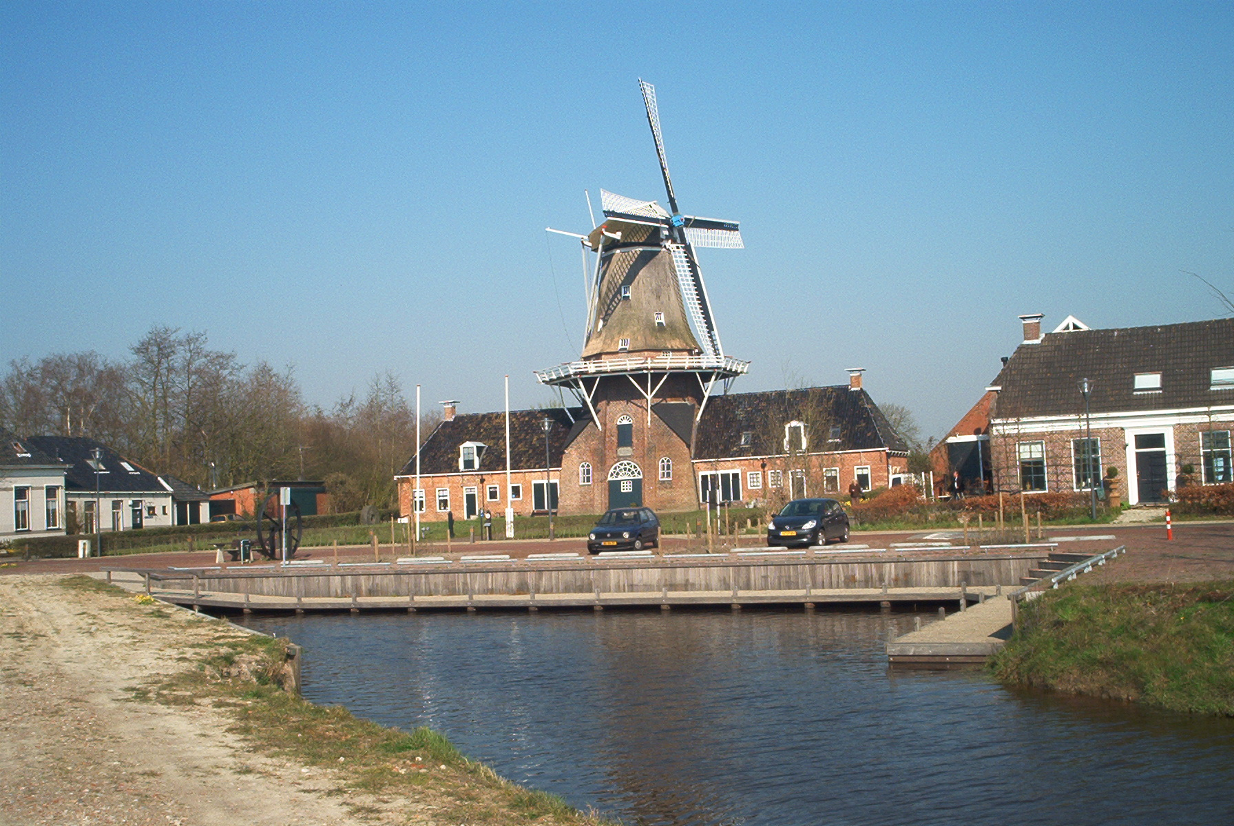 Haven met molen Woldzicht